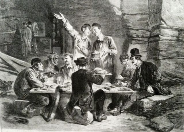 Gravure représentant un repas dans les vides des carrières dites d'Amérique, dans le 19e arrondissement de Paris.